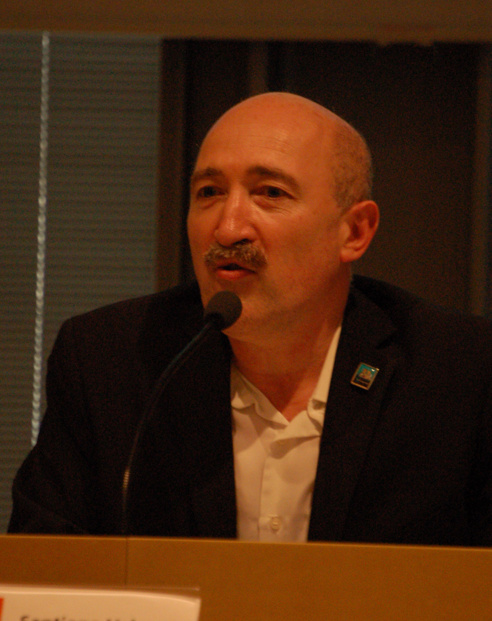 Santiago Veloso, presidente da asociación Ponte... nas ondas!, no Congreso Pontes de cultura, pontes de futuro, celebrado no Verbum - Casa das palabras de Vigo